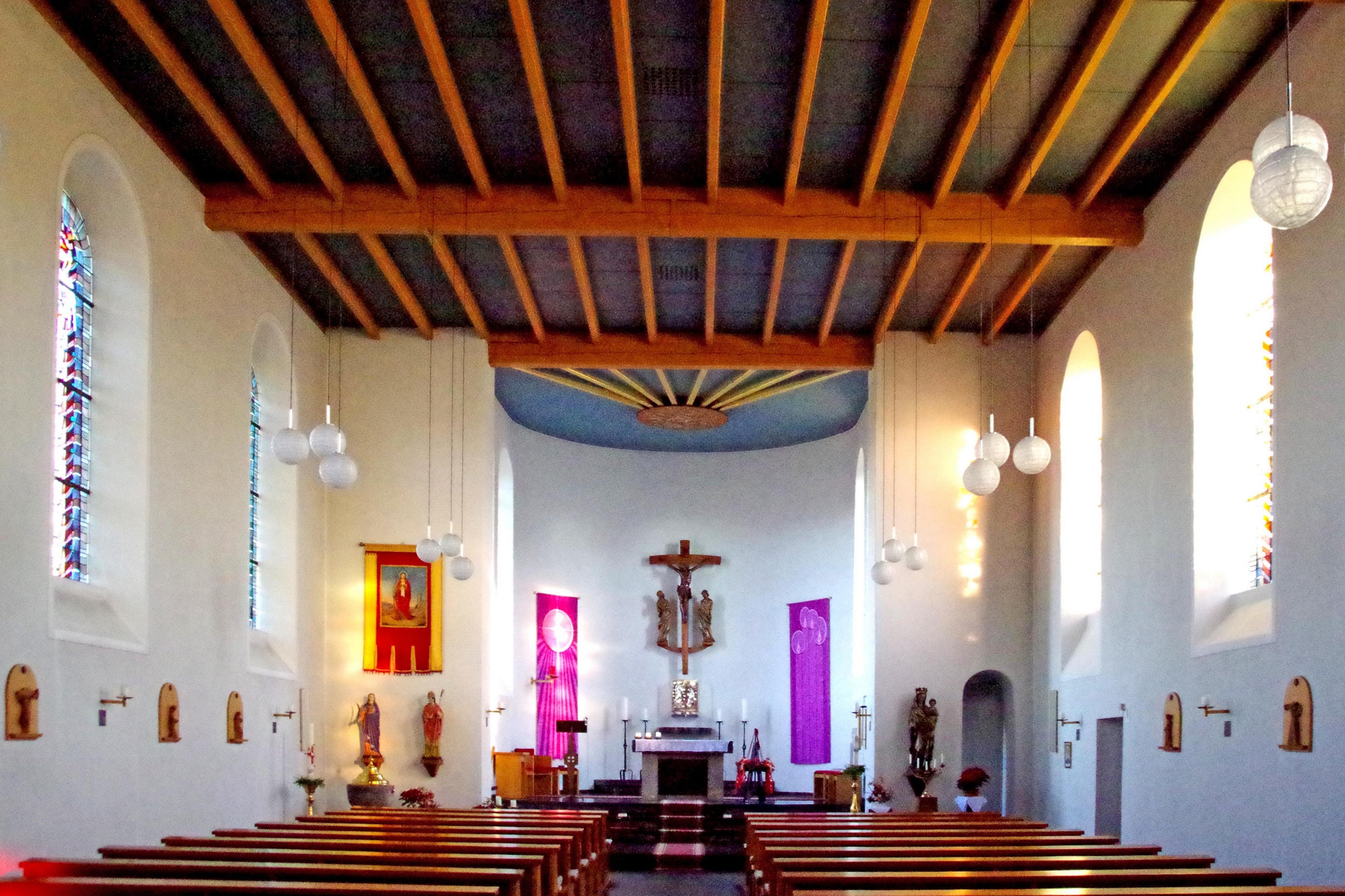 St. Barbara (Rurberg), Innenraum mit Blick zum Altar